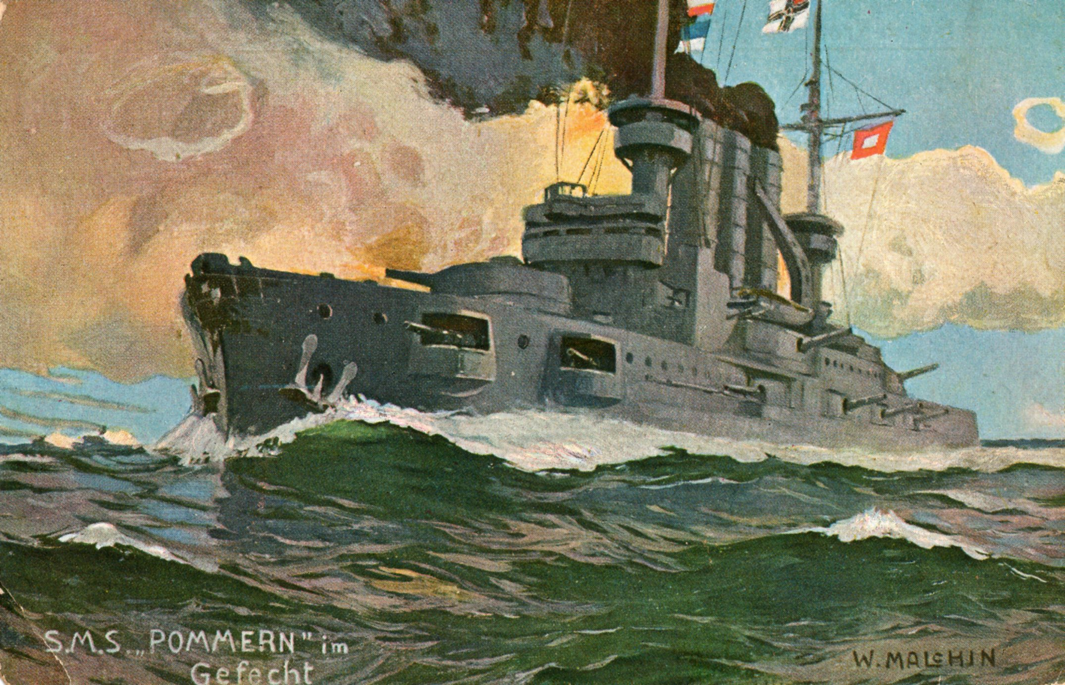 Linienschiff SMS POMMERN im Gefecht. Gemälde von Wilhelm Malchin ca. 1914